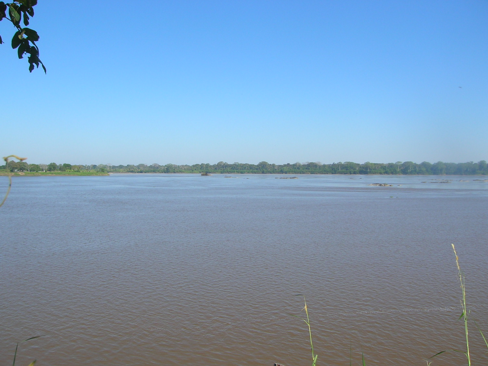 Encontro dos Rio Mamoré e Beni. Guajará-Mirim, RO. 2008.